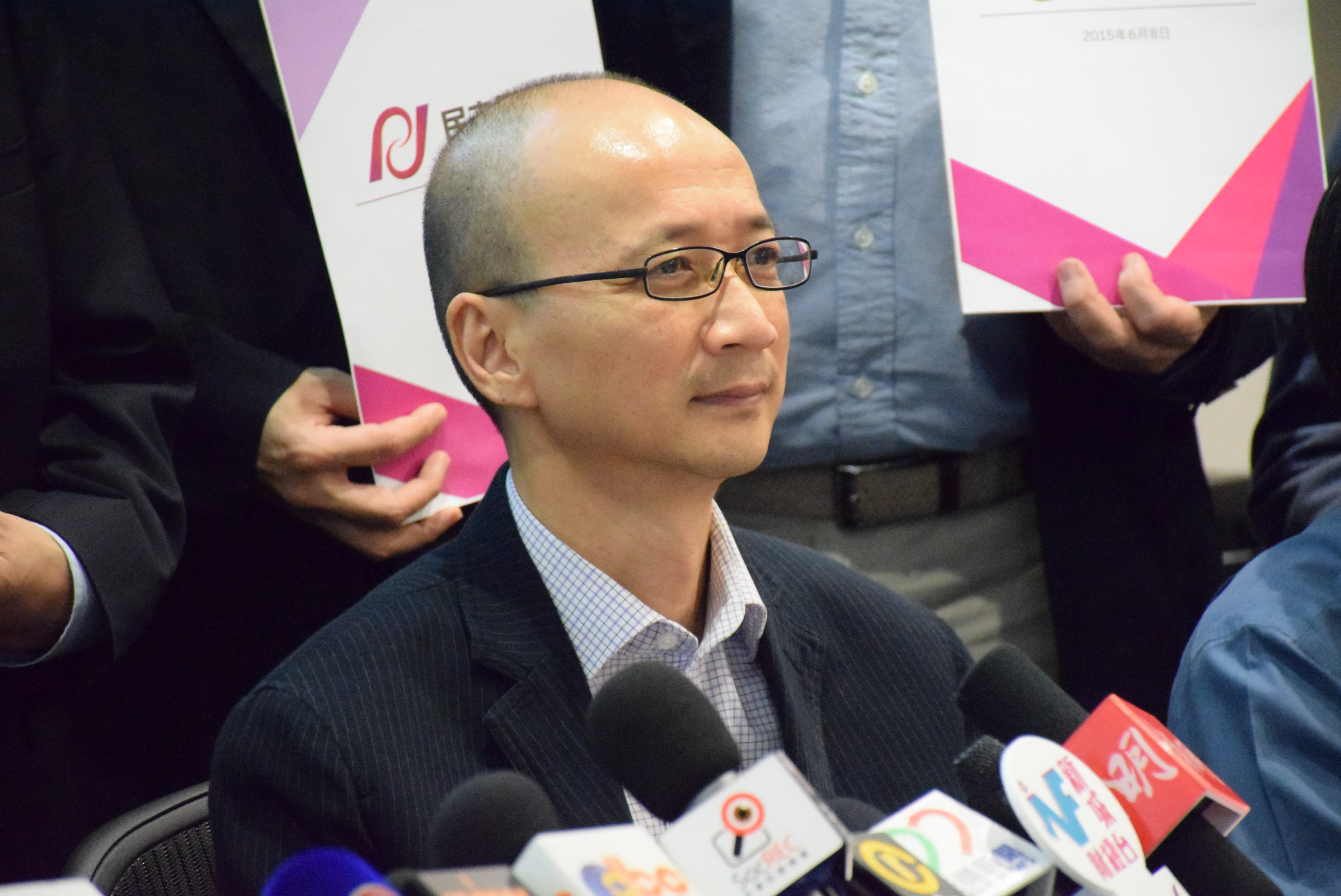 「民主思路」聯席召集人陳祖為表示，智庫內部已經開始討論有關一國兩制具爭議的問題。（美國之音湯惠芸攝）